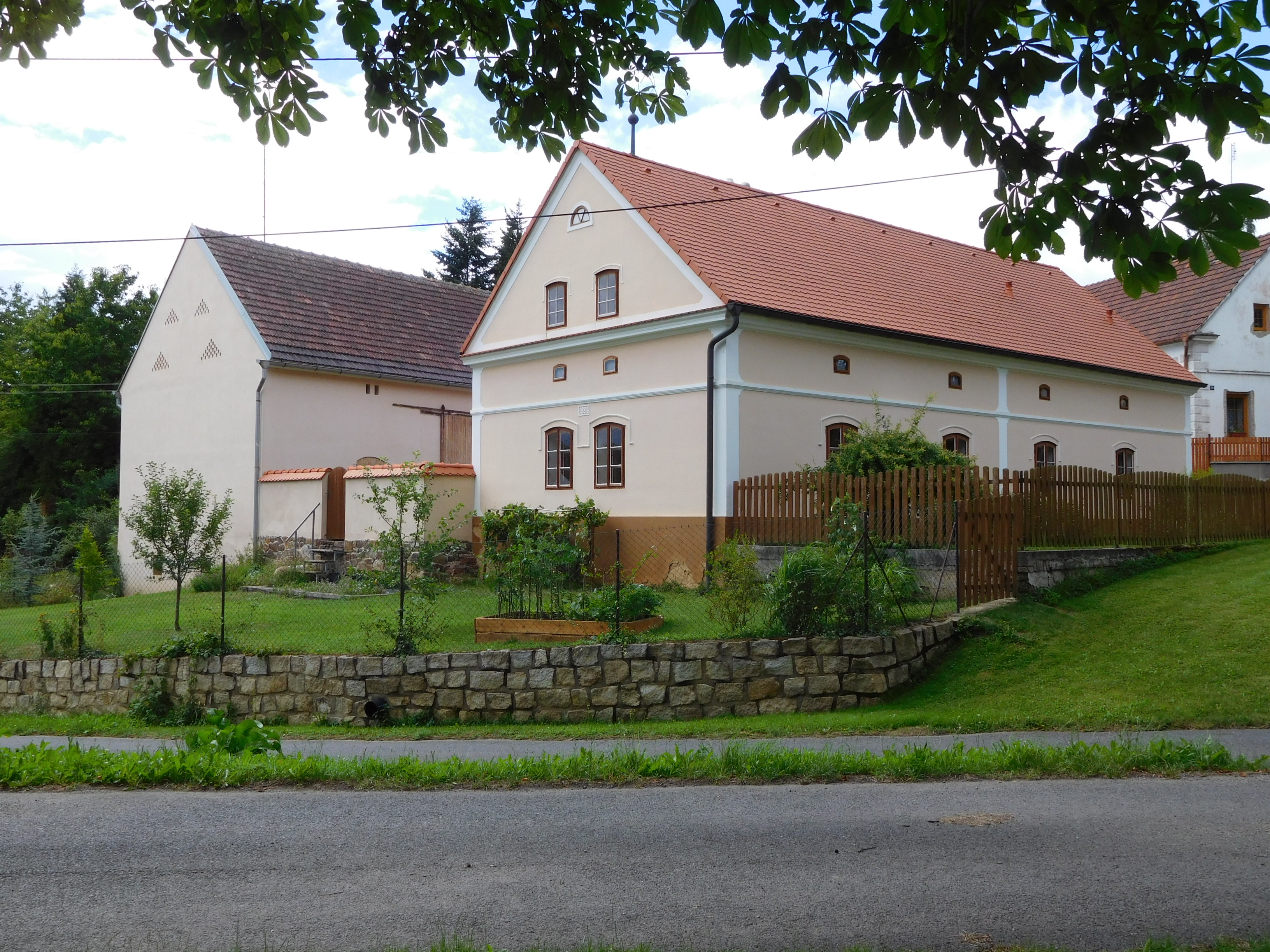 Čerňovice - dům č.p. 35